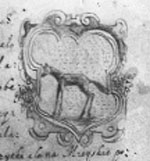 Беларуская (тарашкевіца): Герб Лагішына (Łahišyn)